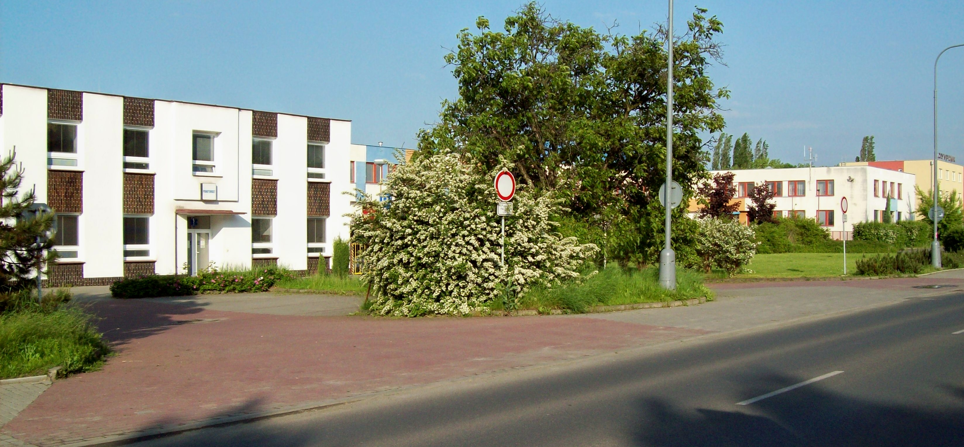 Mělník, Bezručova ulice. Zleva doprava: výjezdové stanoviště Územního střediska záchranné služby Středočeského kraje, Hasičský záchranný sbor Středočeského kraje a Hotel Olympionik